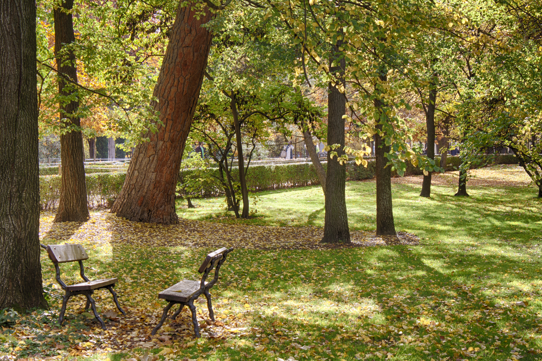 Parque El Capricho Madrid Comunidad de Madrid España